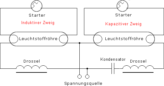 Schaltbild einer Duoschaltung